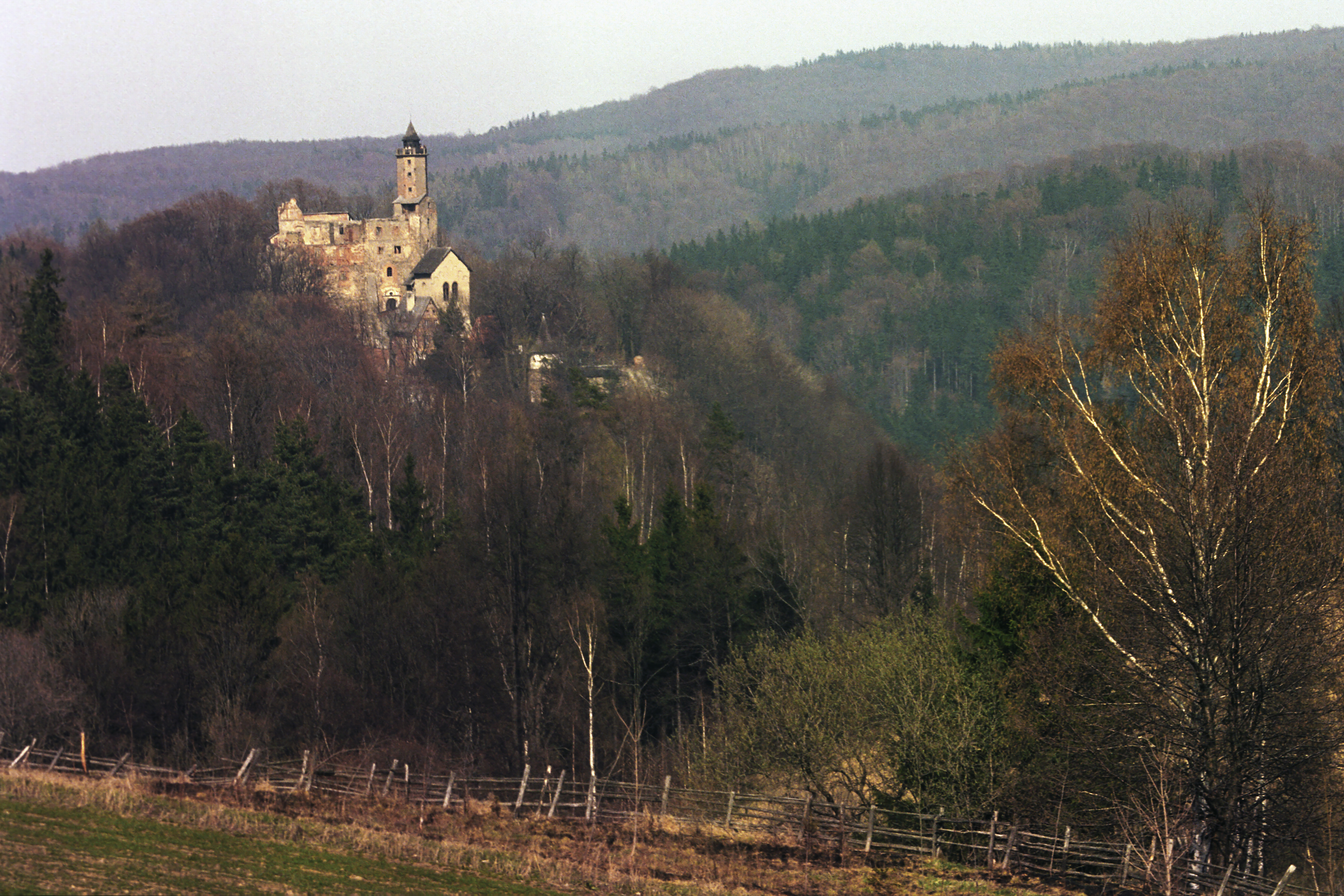 Poland, Chojna Castle (Zagorze Slaskie)